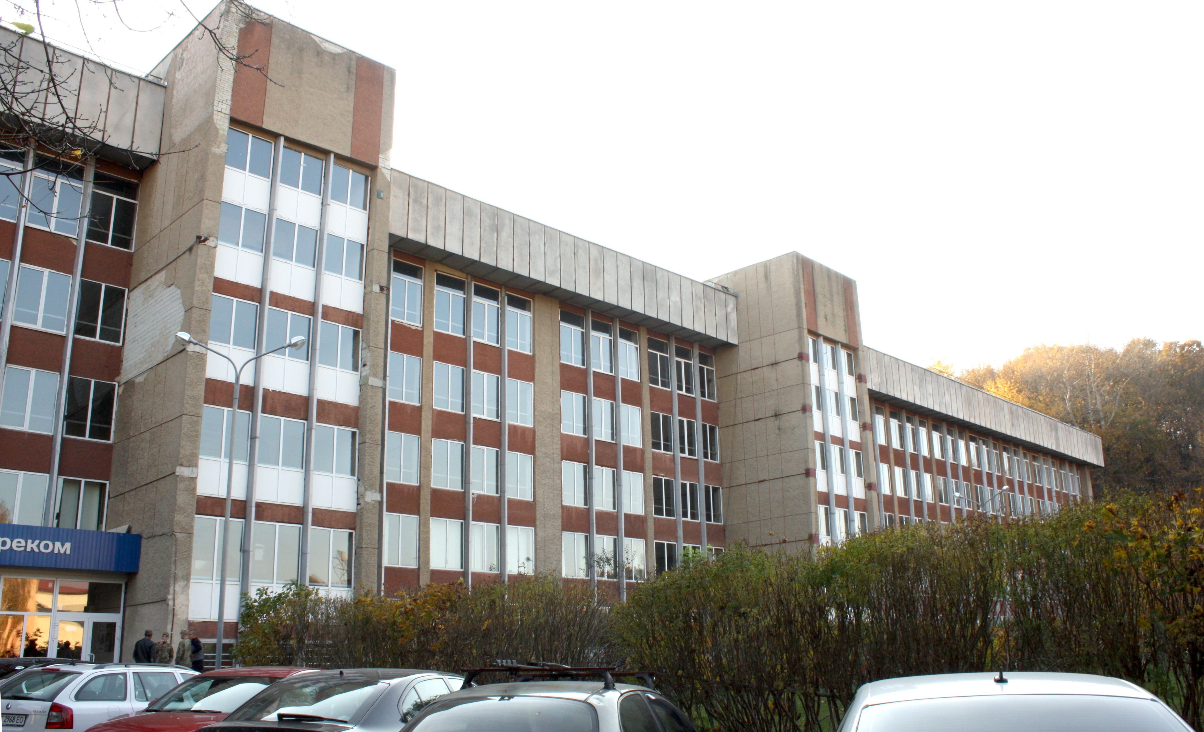 Легкоатлетичний манеж з велотреком або Велотрек СКА у Львові. Головний фасад будівлі